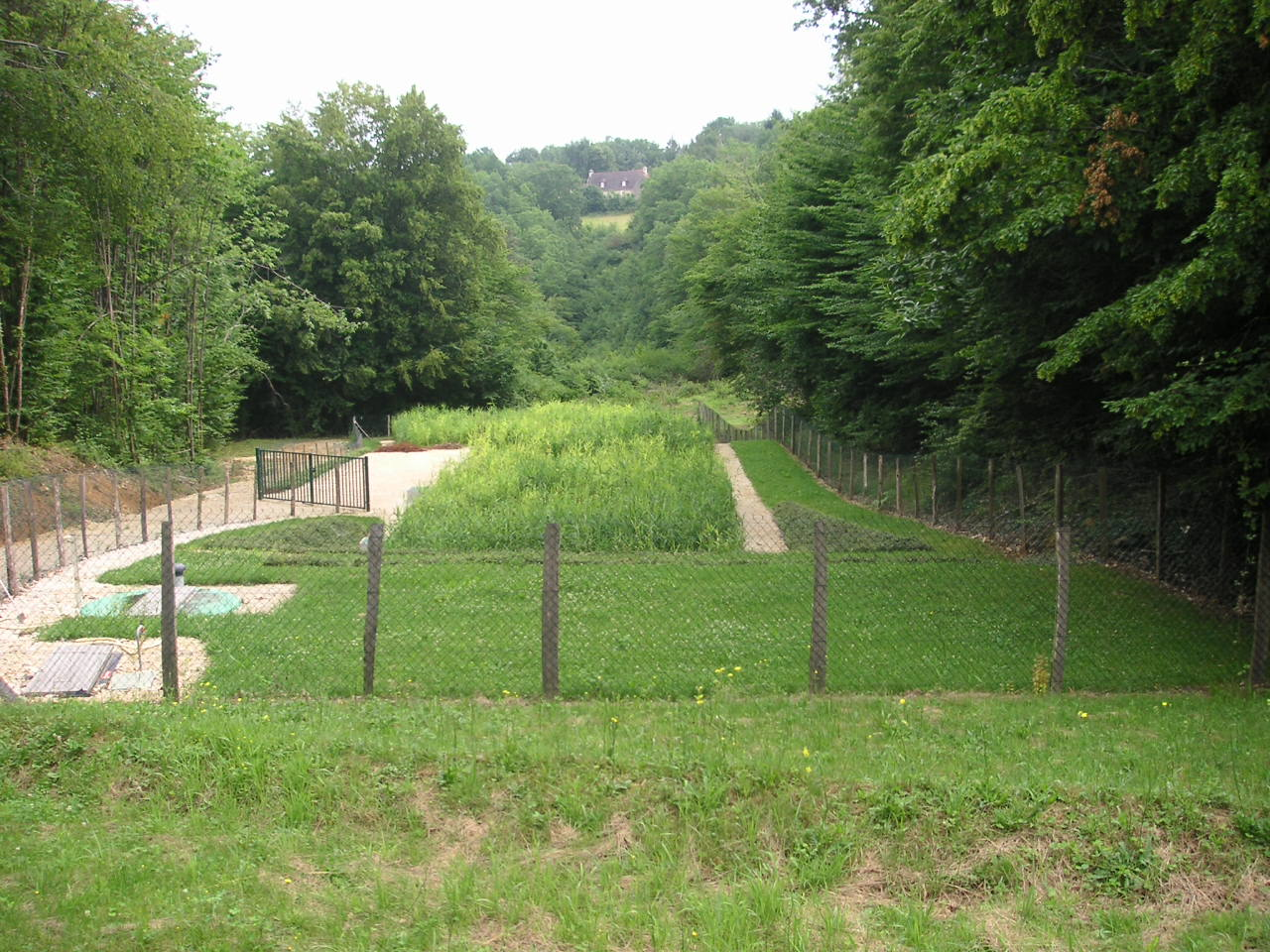 Vue de la roselière installée pour le traitement des eaux usées en contrebas d'un petit bourg (La Chapelle Aubareil, Périgord; cliché pris en Juillet 2006 par un Wikipédien)